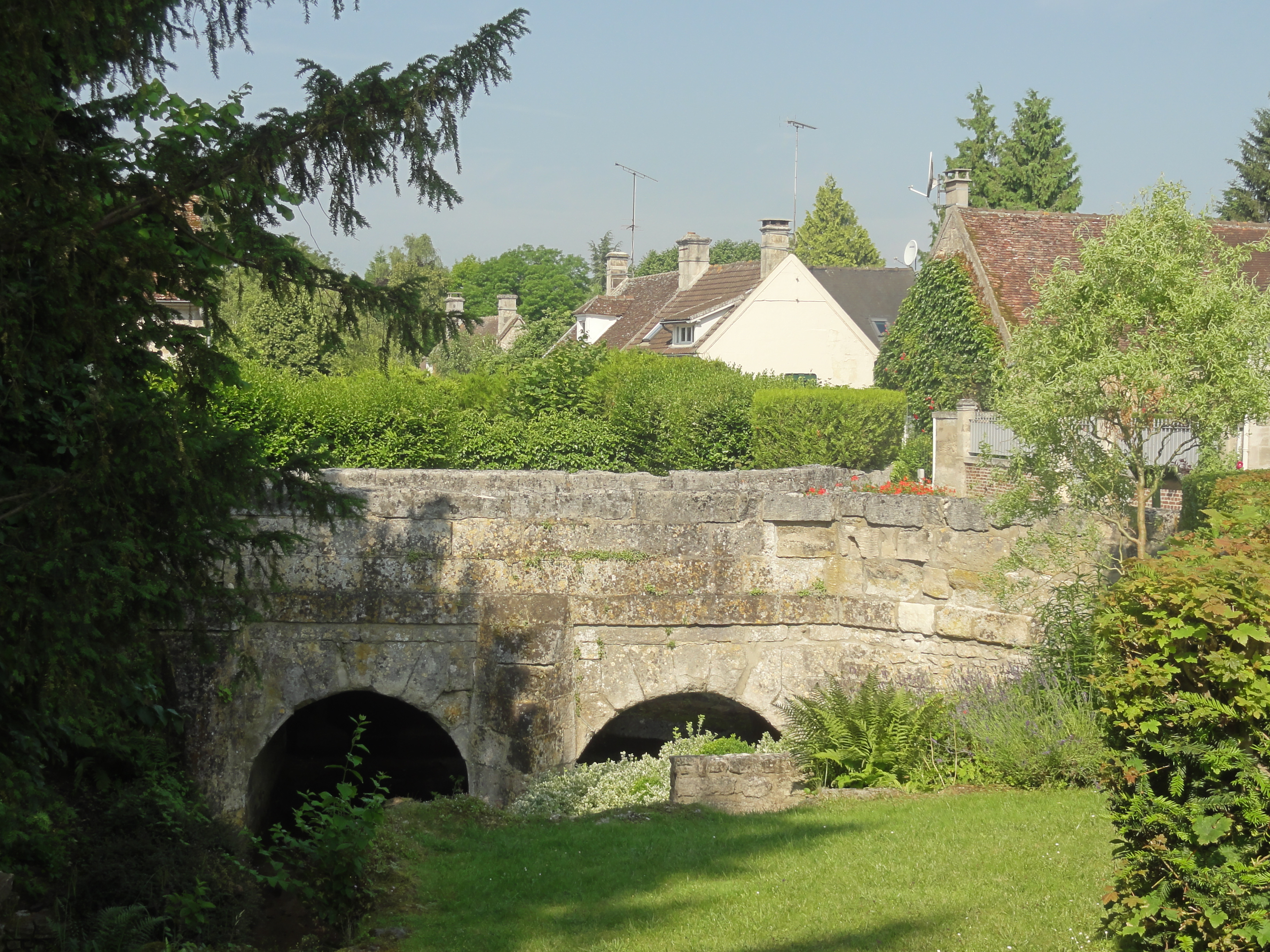 Pont devant la porte fortifiée de l'abbaye, au nord.